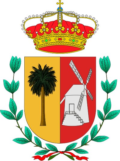 Escudo de Antigua (Fuerteventura, Las Palmas, España)